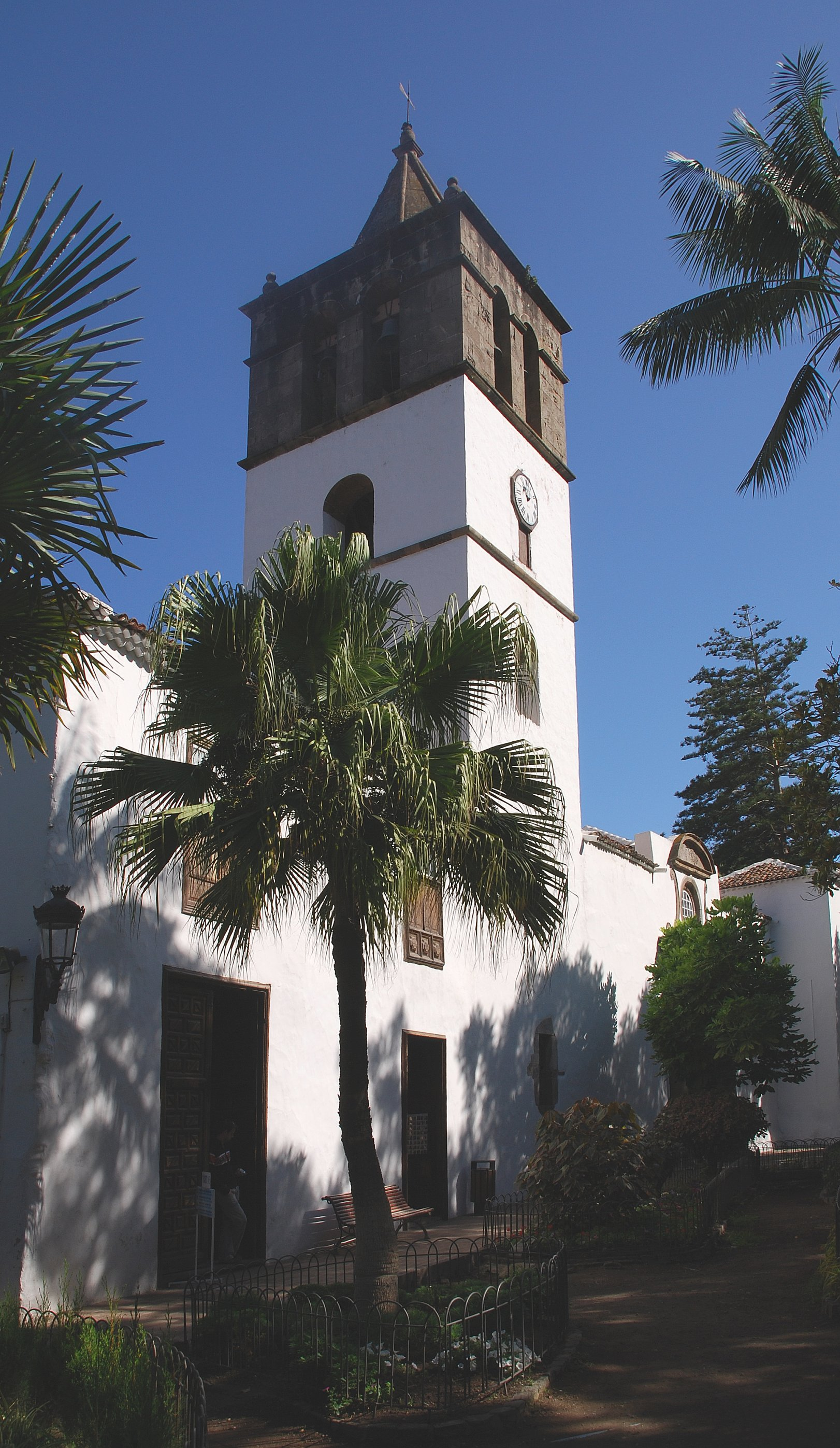 Iglesia de San Marco in Icod de los Vinos, Teneriffa